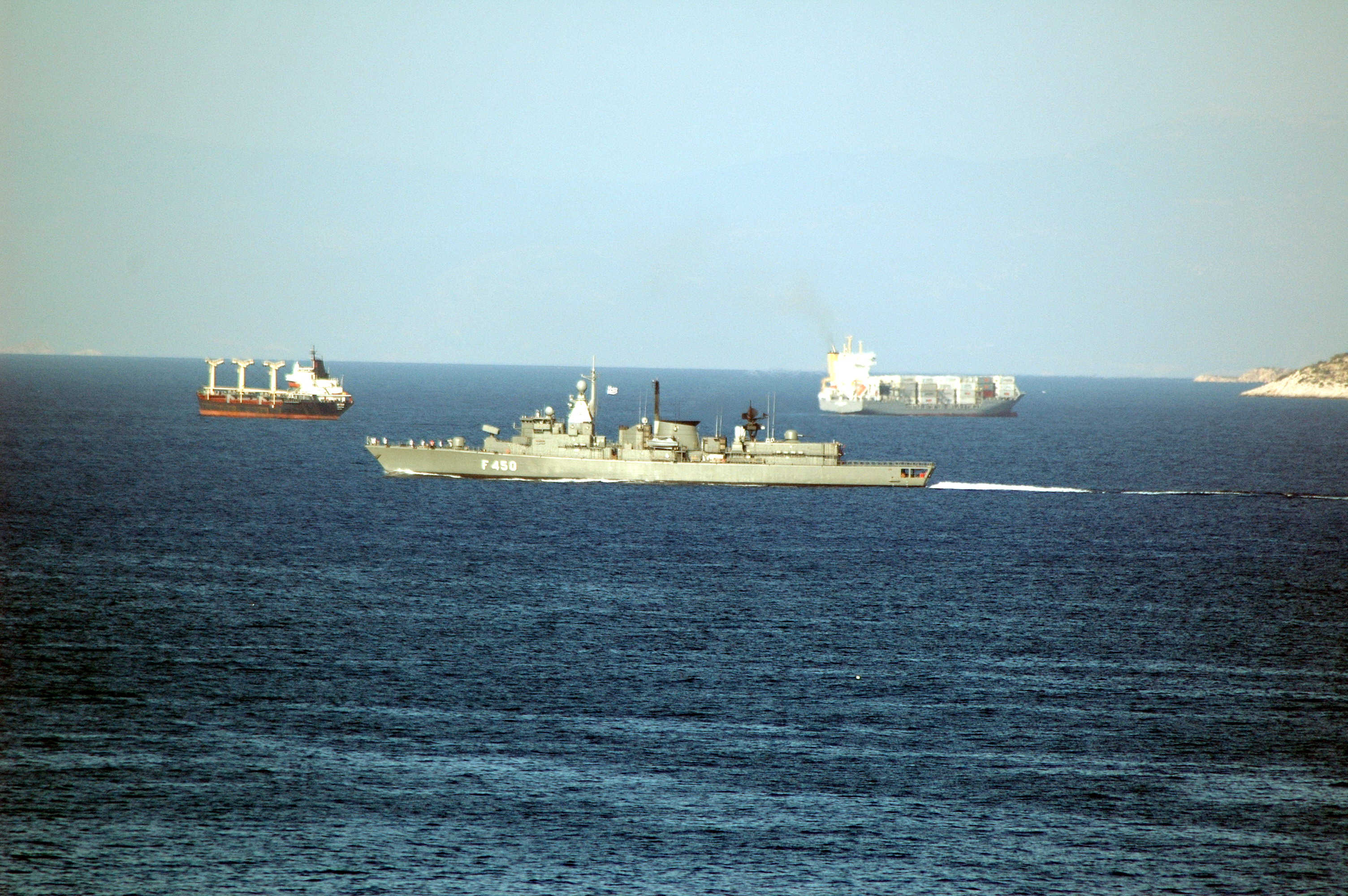 Greek frigate Elli (F-450)